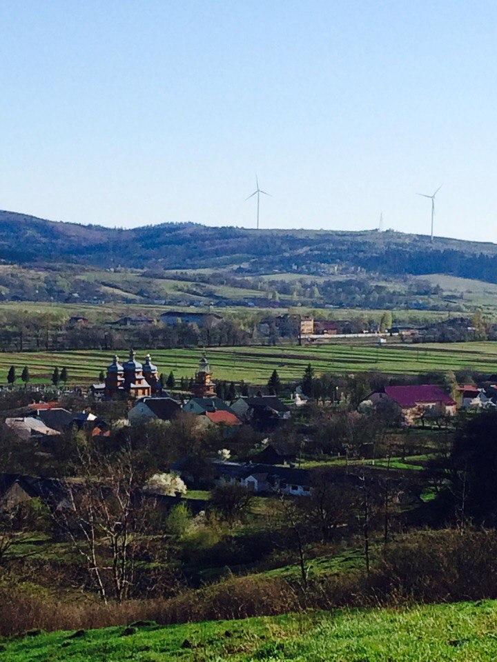 Вид на Торчиновичі